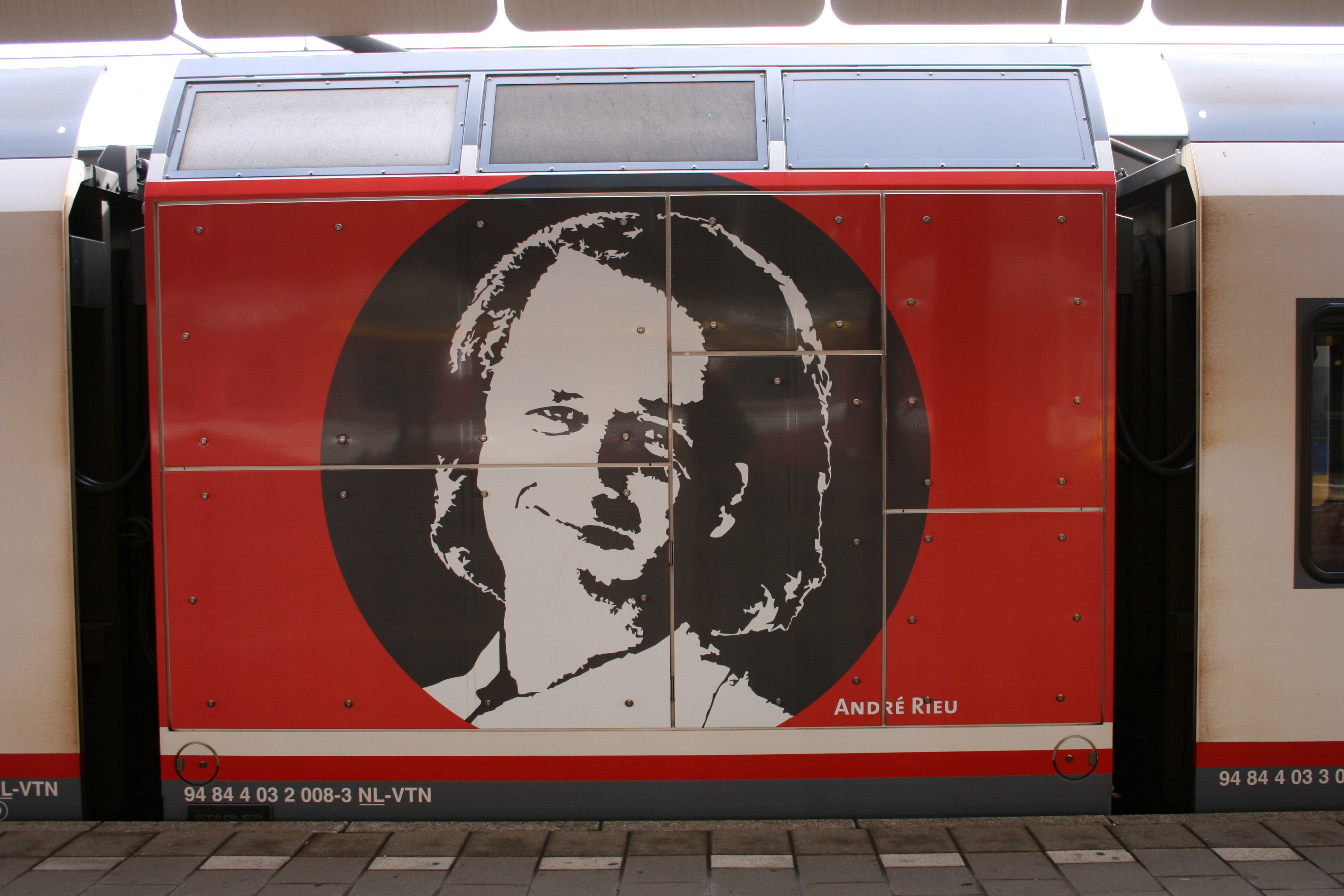 Veolia Stadler FLIRT "André Rieu"